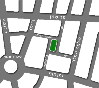 בלוק טיפוסי בתוכנית גדס